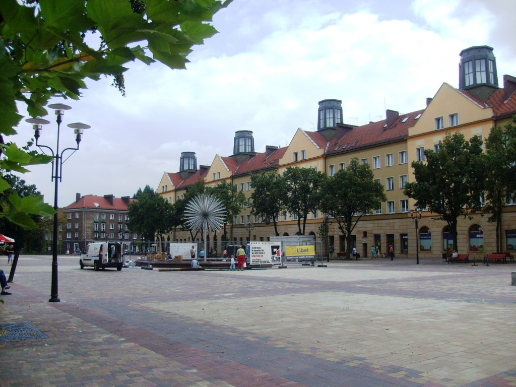 Plac Baczyńskiego w Tychach